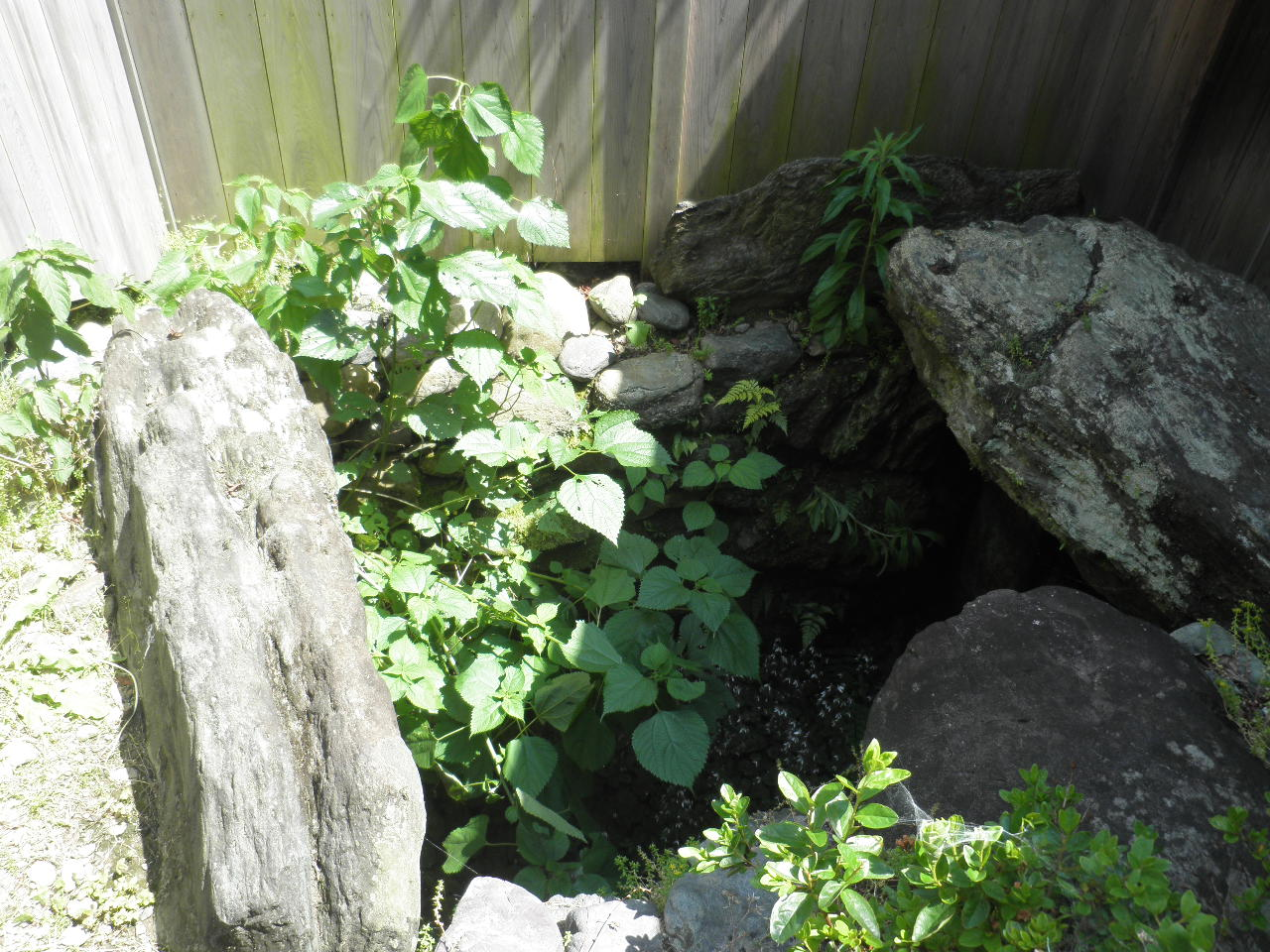 真田の抜け穴とも言われる真田古墳